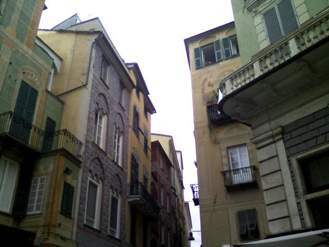 Antonello Piccone, Savona (Italy) via Pia in prossimità di piazza della Maddalena.